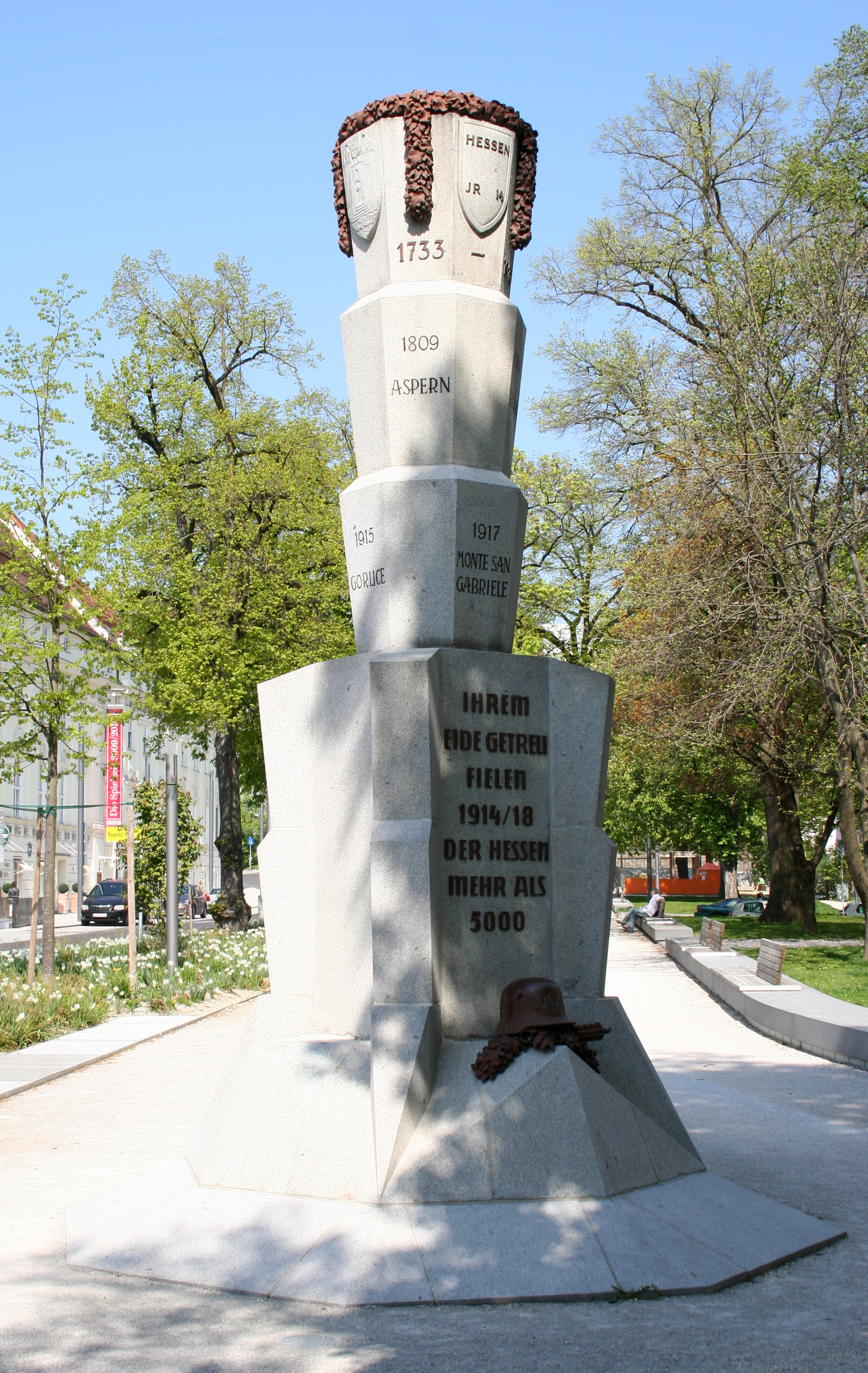 Hessendenkmal in der Linzer Innenstadt (Promenade, beim Landhaus); erinnert an das 1733 begründete Infanterieregiments Nr. 14 (als „Hessen“ seit 1779 Linzer Hausregiment)